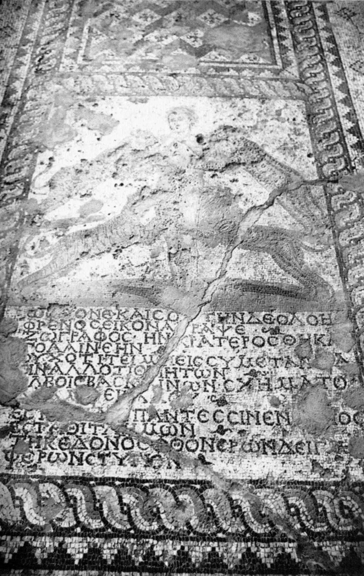 Mosaik vom Eingang des Hauses mit apotropäischer Inschrift und Repräsentation des Neids (Phthonos), der von wilden Tieren zerrissen wird. Standort Kefalonia